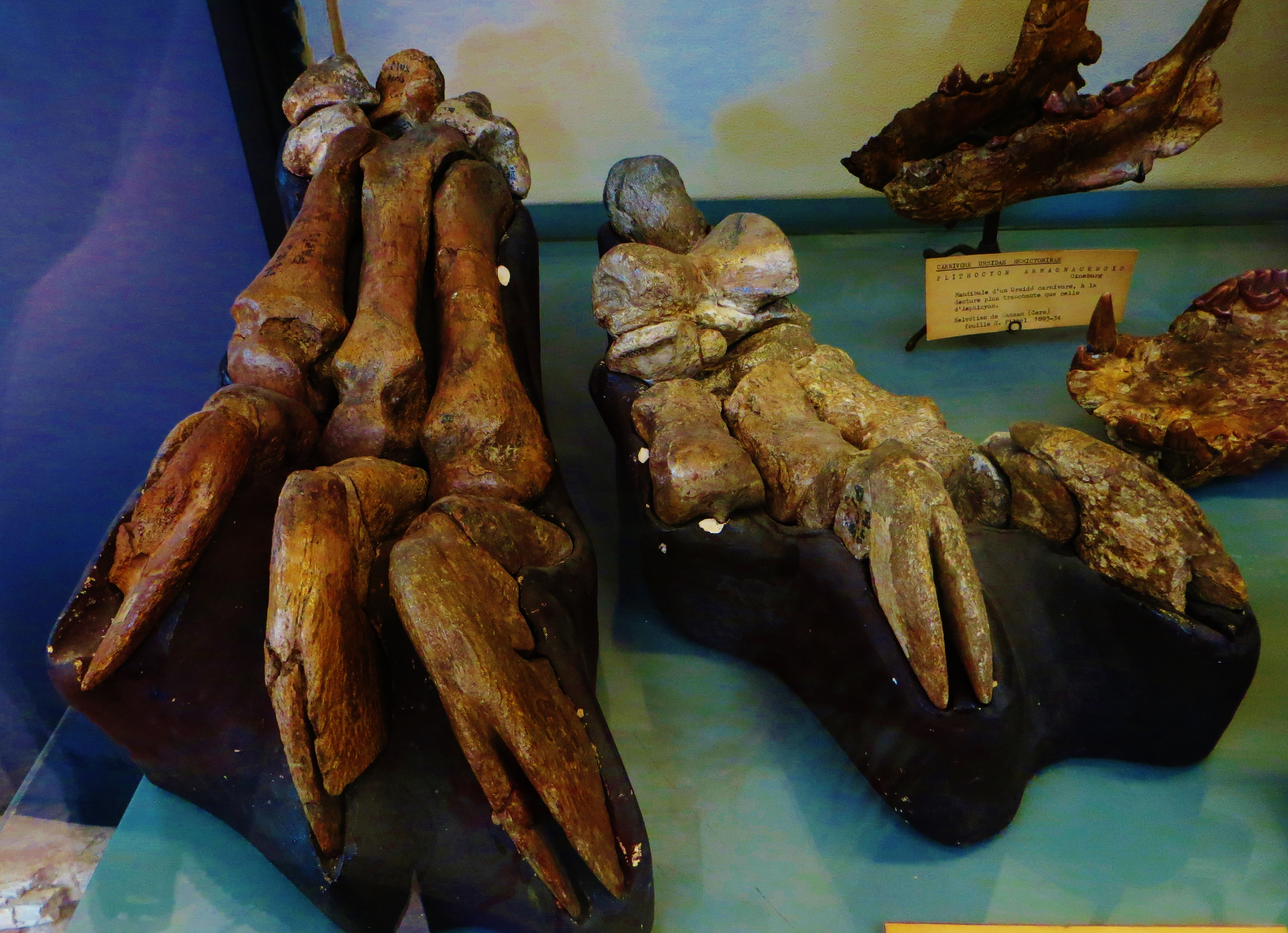 Fossil of Anisodon, an extinct mammal- Took the photo at Musee d'Histoire Naturelle, Paris